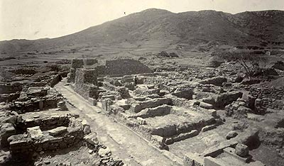 Minoische Ruinen in Roussolakkos. Ausgrabung der Britischen Schule der Archäologie im Jahr 1902.